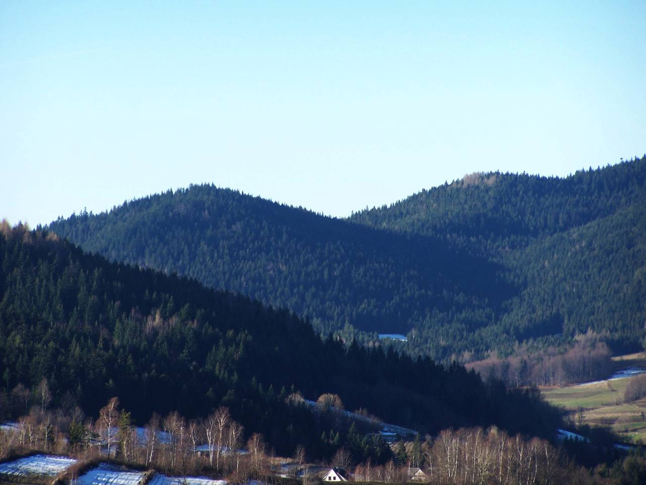 Mały Ćwilinek (Beskid Wyspowy)